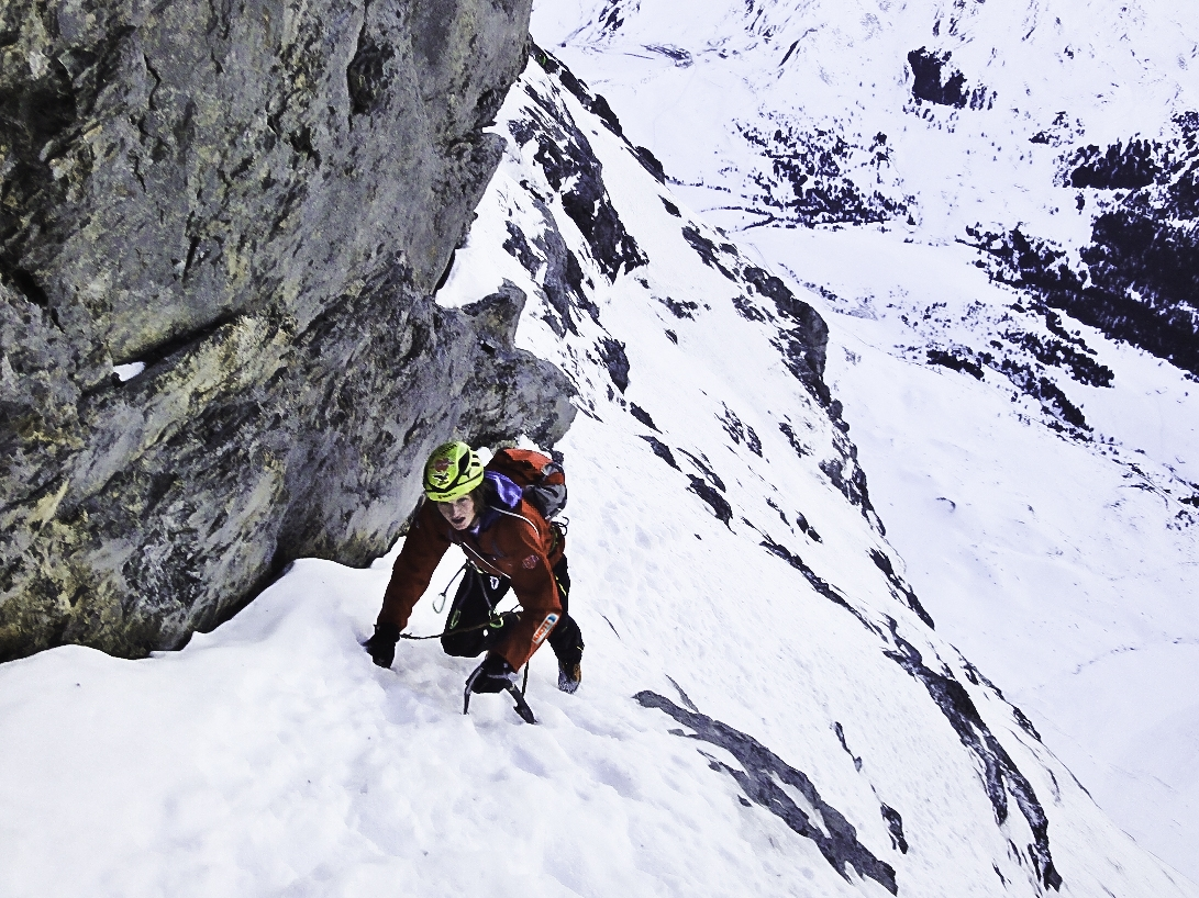 Michael Wohlleben Speed-Besteigung der Eiger-Nordwand 2011